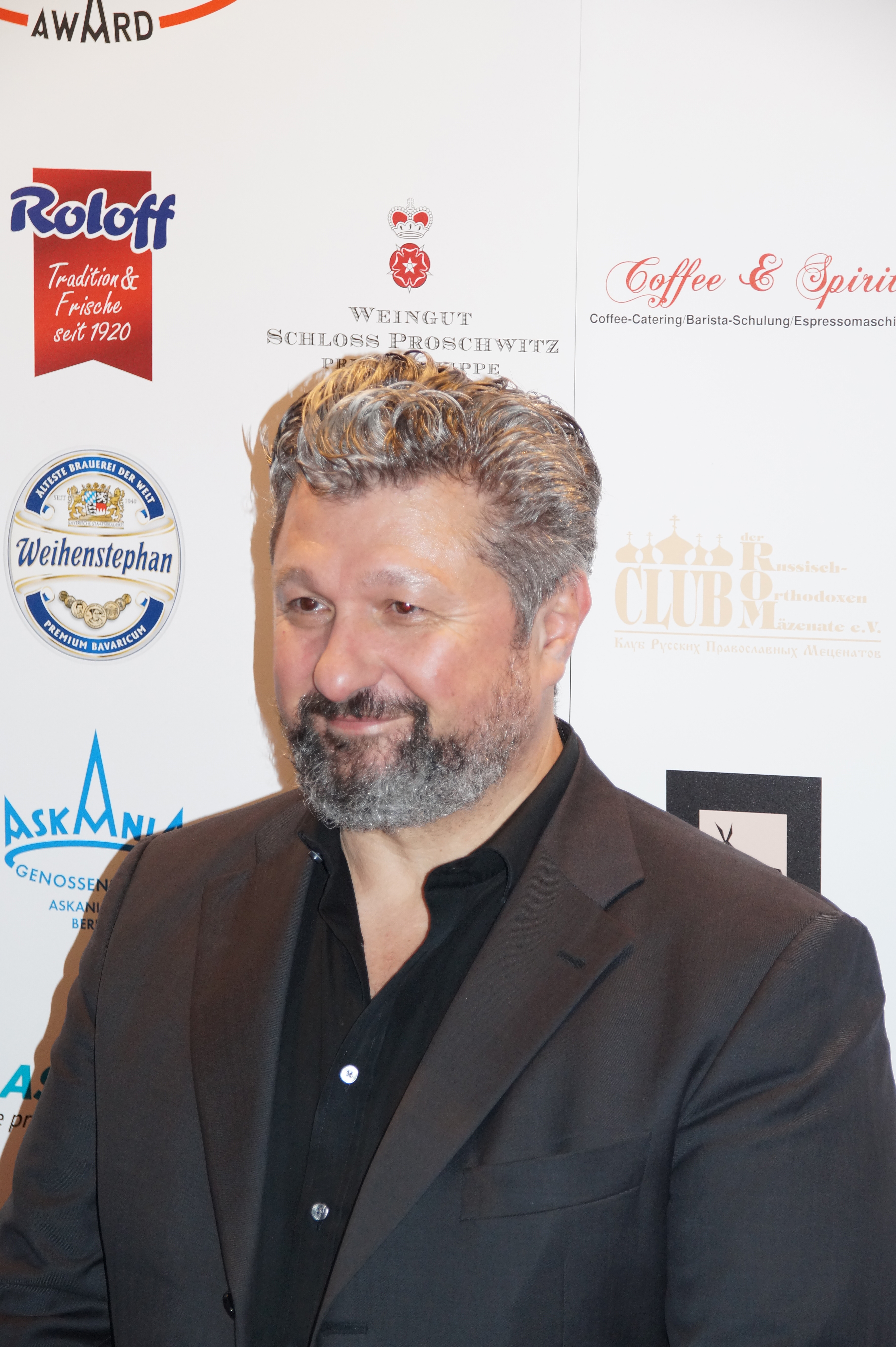 Aykut Kayacik beim Askania Award 2016.